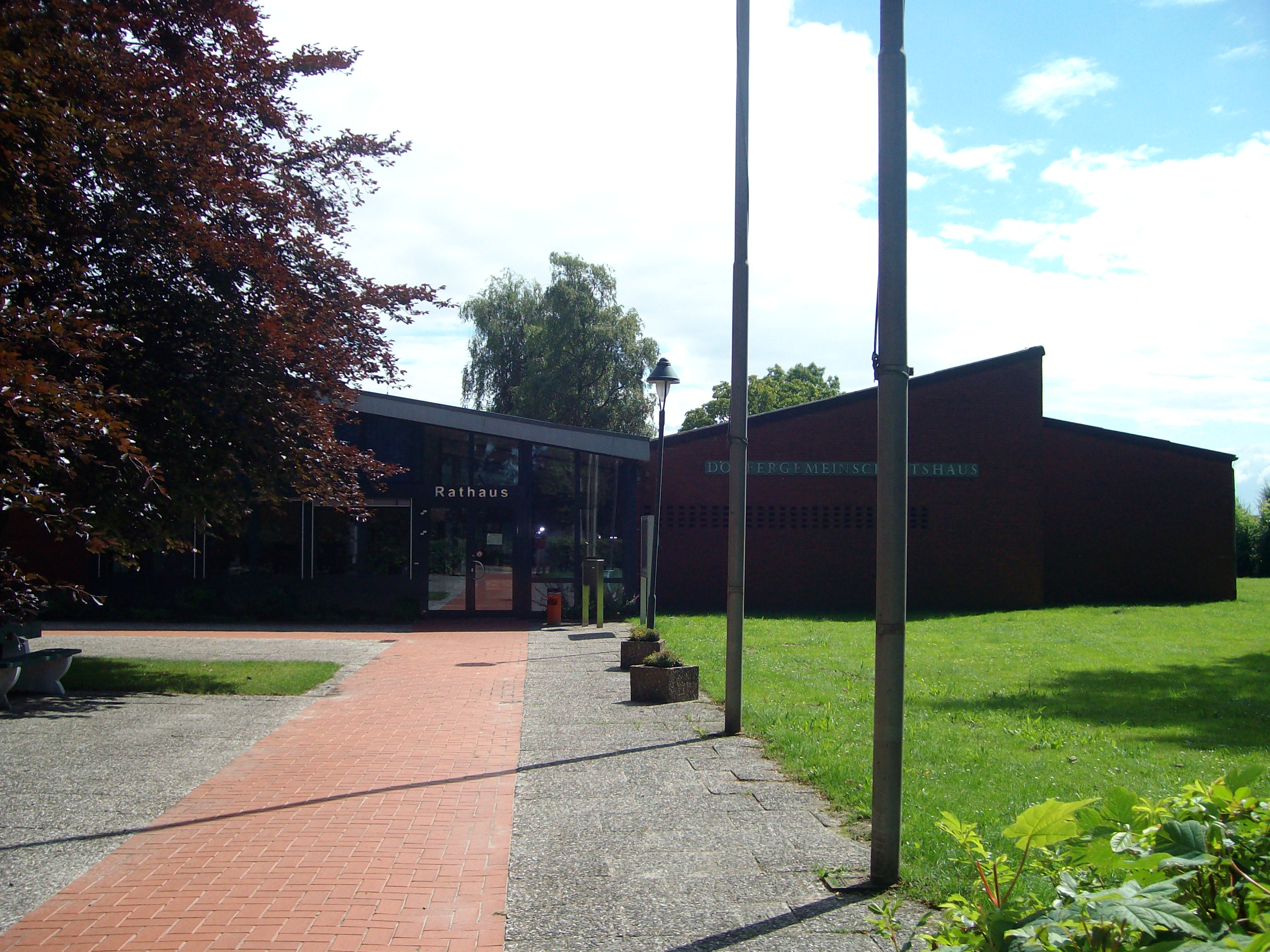 Rathaus in Jemgum, Ostfriesland